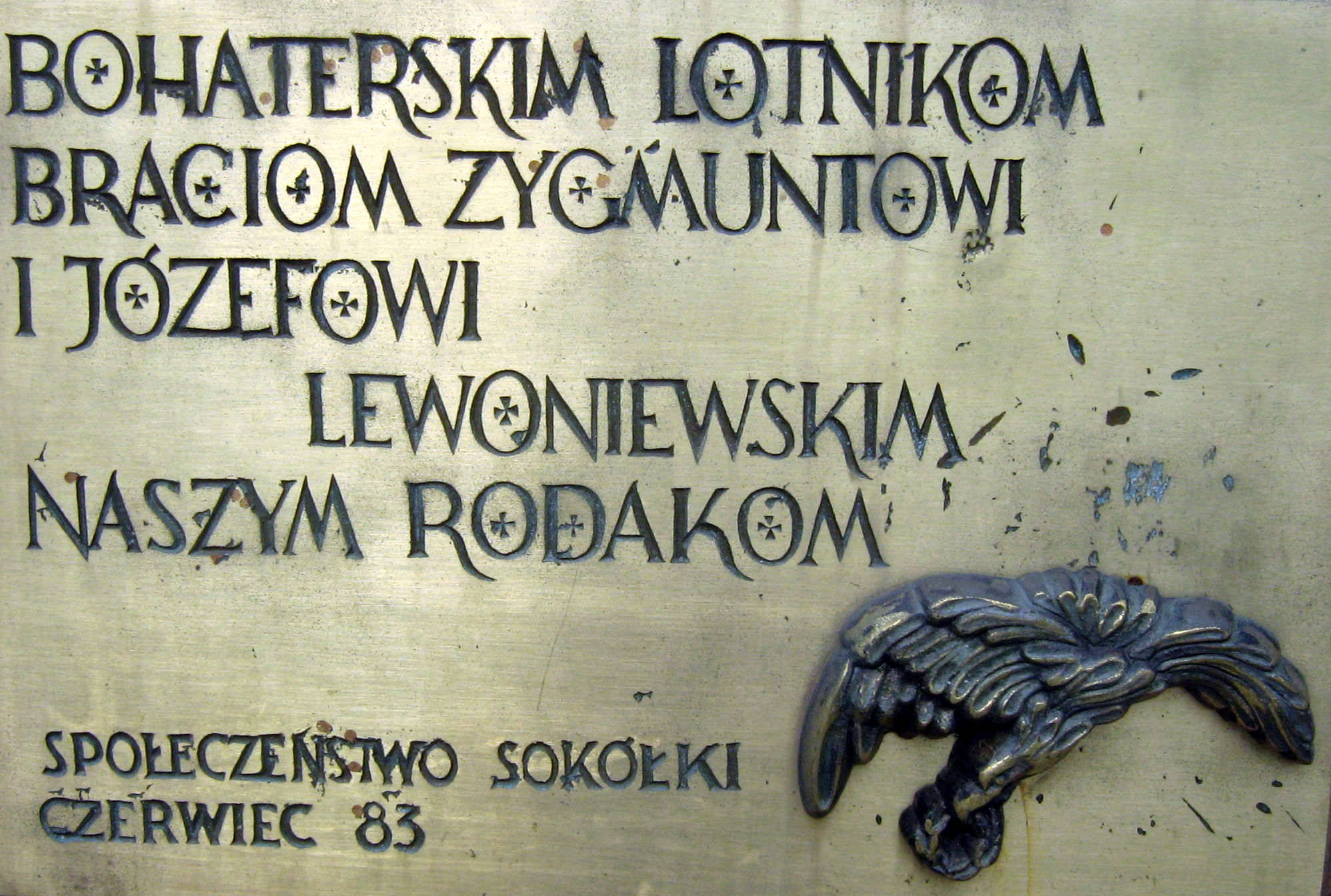 Tablica na kamieniu poświęcona braciom Lewoniewskim w Sokółce